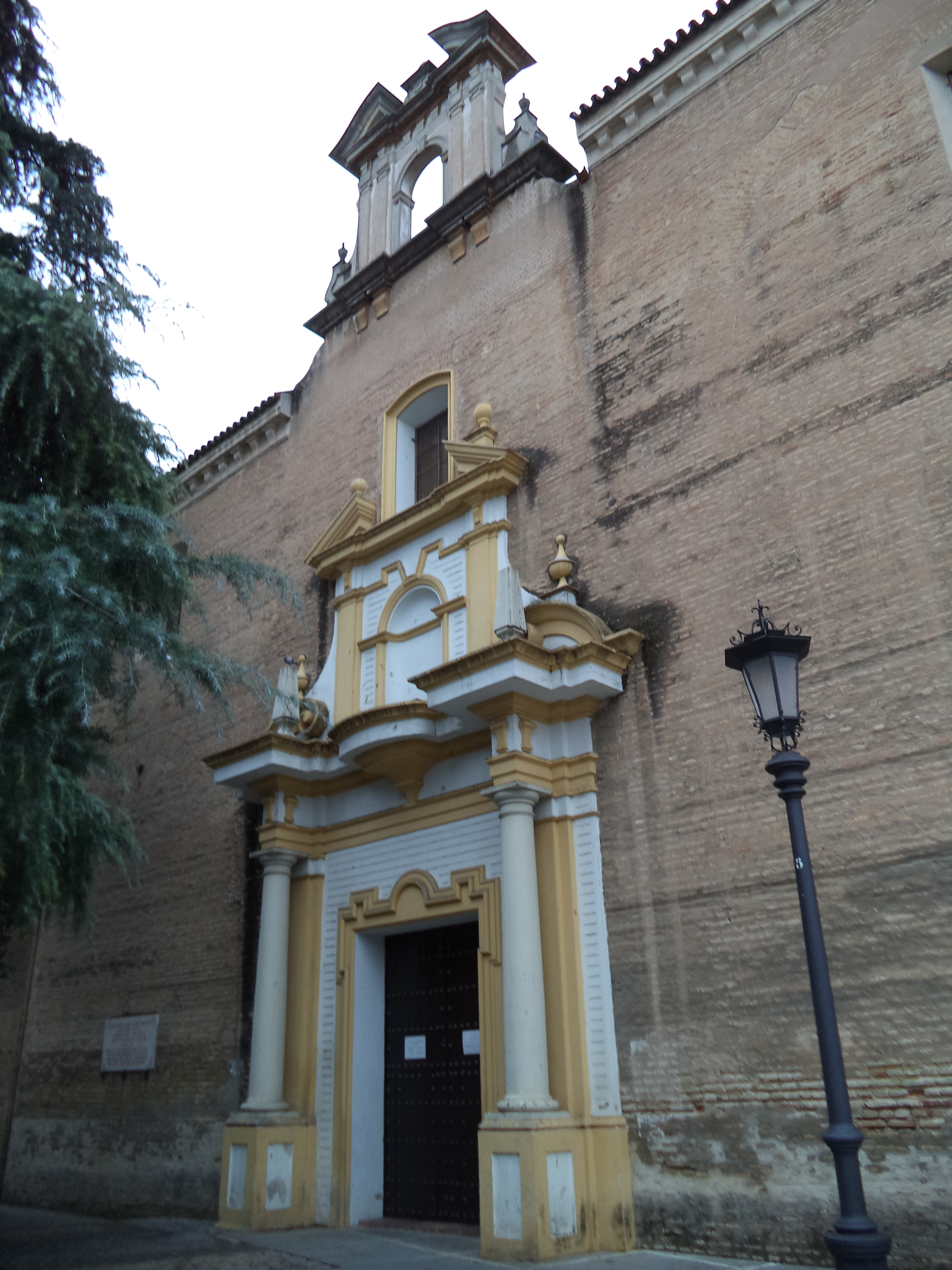 Iglesia de San Hermenegildo en la Ronda Norte de Sevilla.